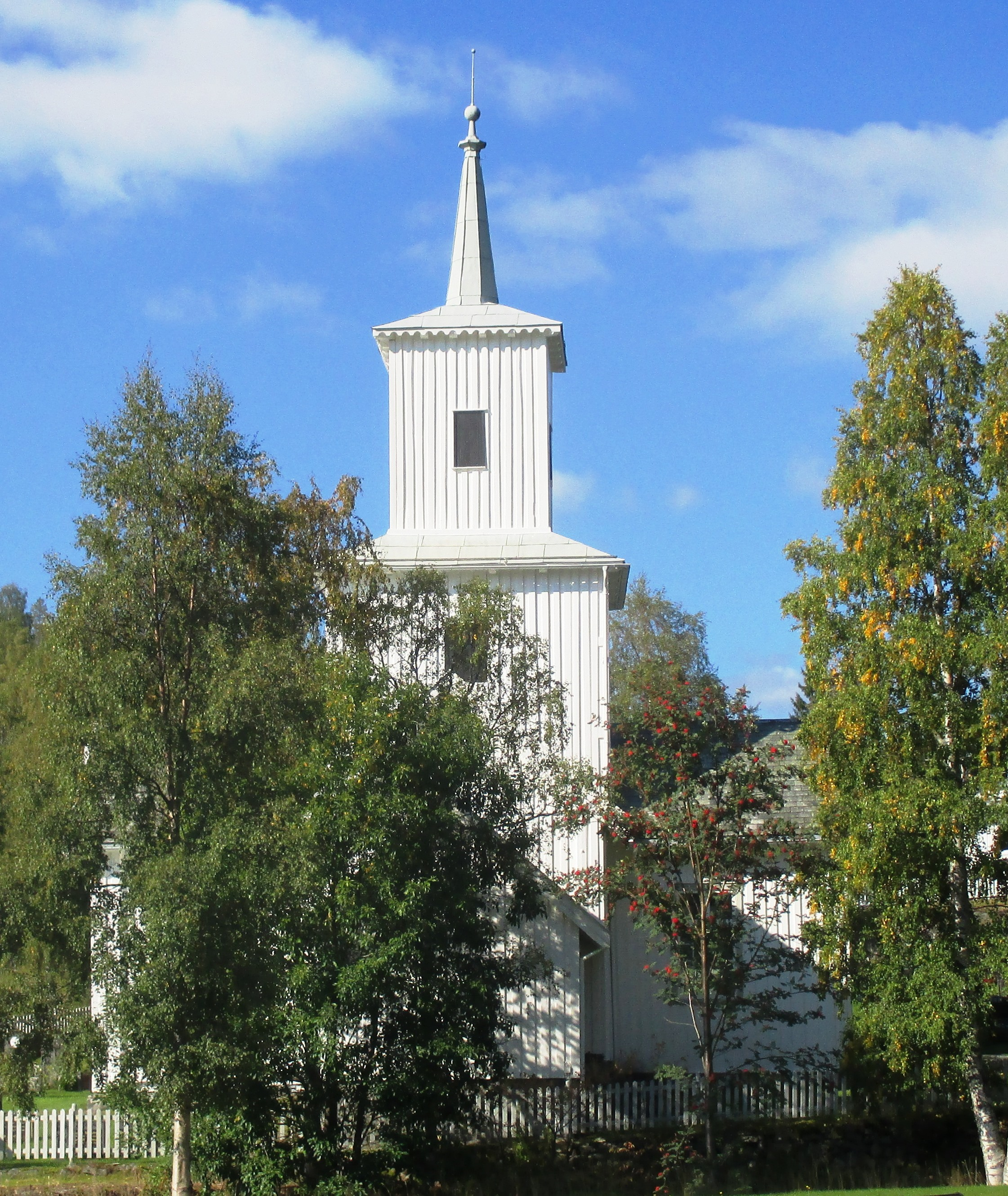 Tuddal kirke (Hjartdal kommune)